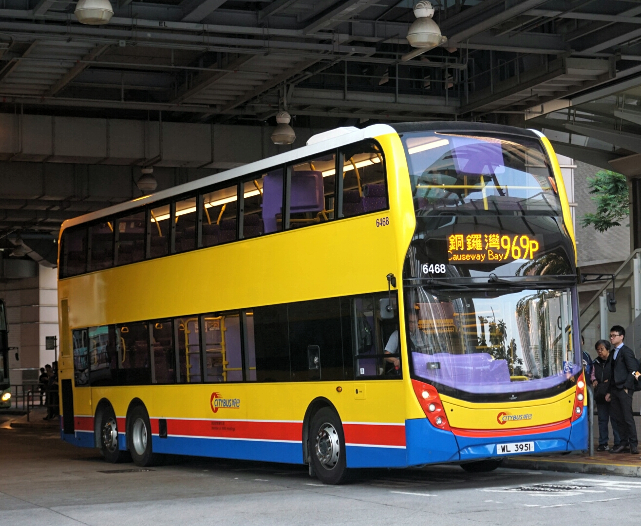 中文（香港）: 過海隧道巴士969P線，正在天水圍市中心上客